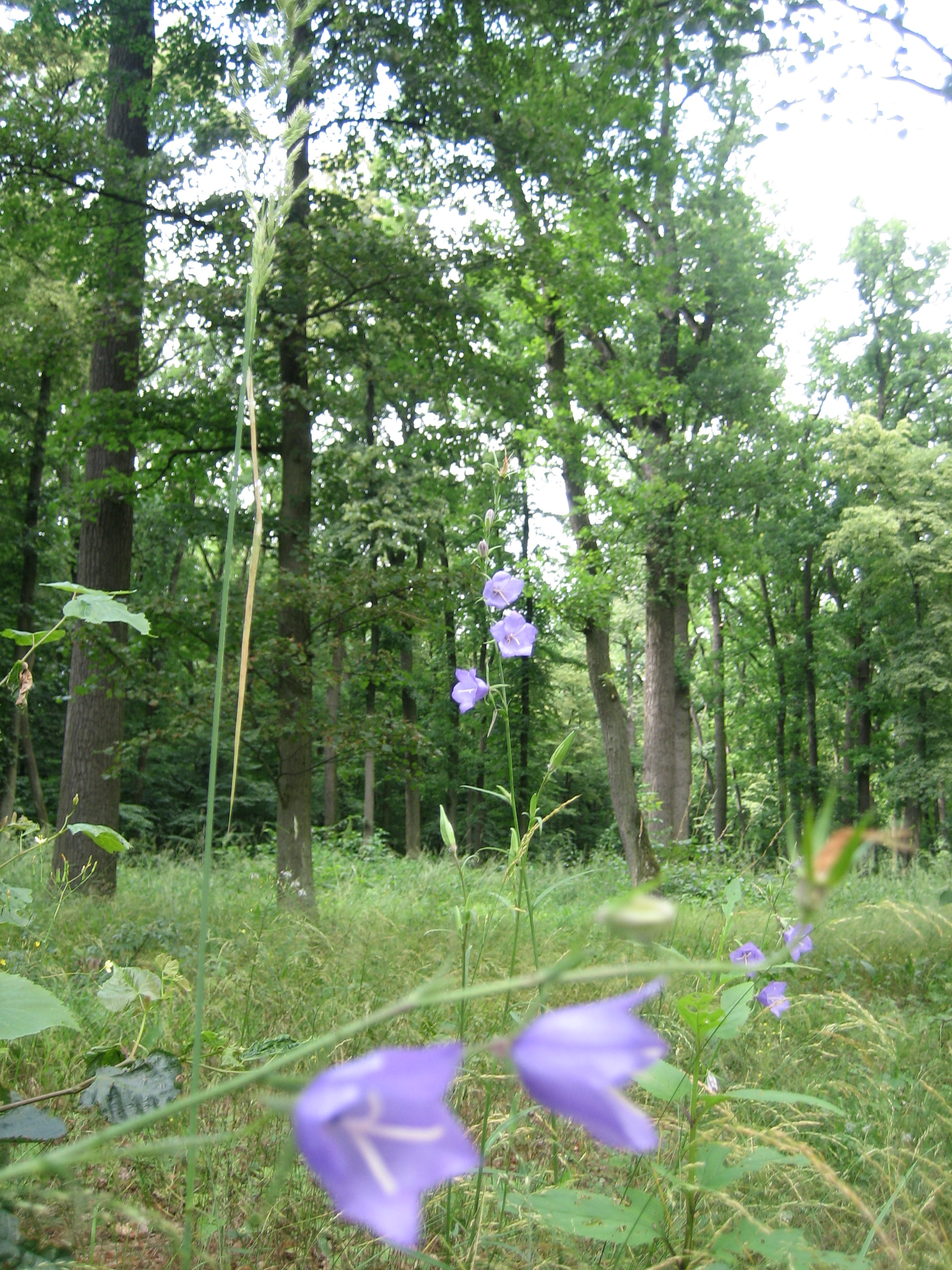 Les Dúbrava v okolí Ratíškovic